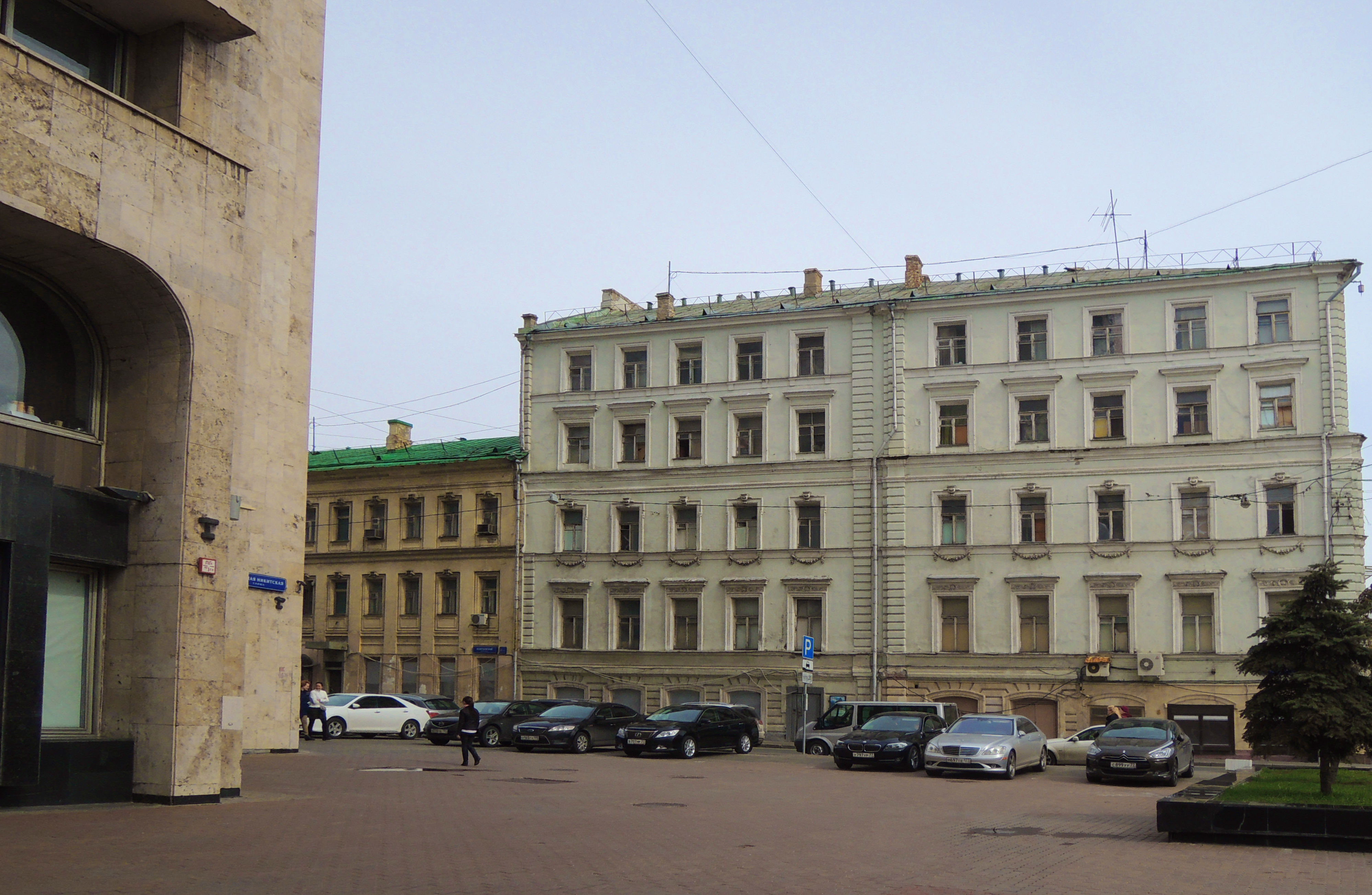 Большая Никитская улица. № 26/2 — Дом Г. Н. Орлова — Н. Б. Юсупова — доходное владение (2-я пол. XIX в., архитектор М. И. Никифоров, в основе городская усадьба П. А. Позднякова-Юсуповых)